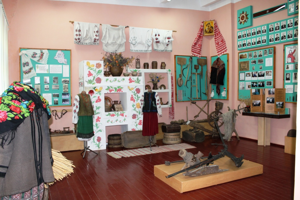 Загальний вигляд експозиції першого залу